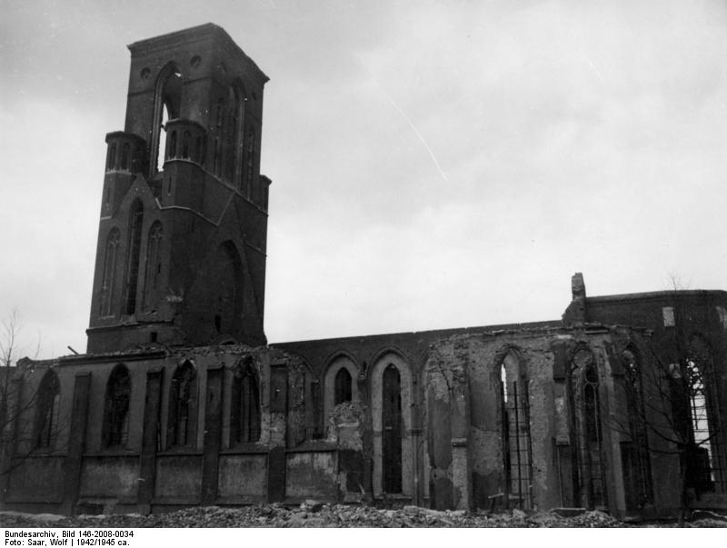 Luftterror über Deutschland Duisburg.- Die im 13. Jahrhundert erbaute Liebfrauen-Kirche in Duisburg, fiel dem anglo-amerikanischen Luftterror zum Opfer. Foto: Wolf Saar/Transocean-Europress LT 86